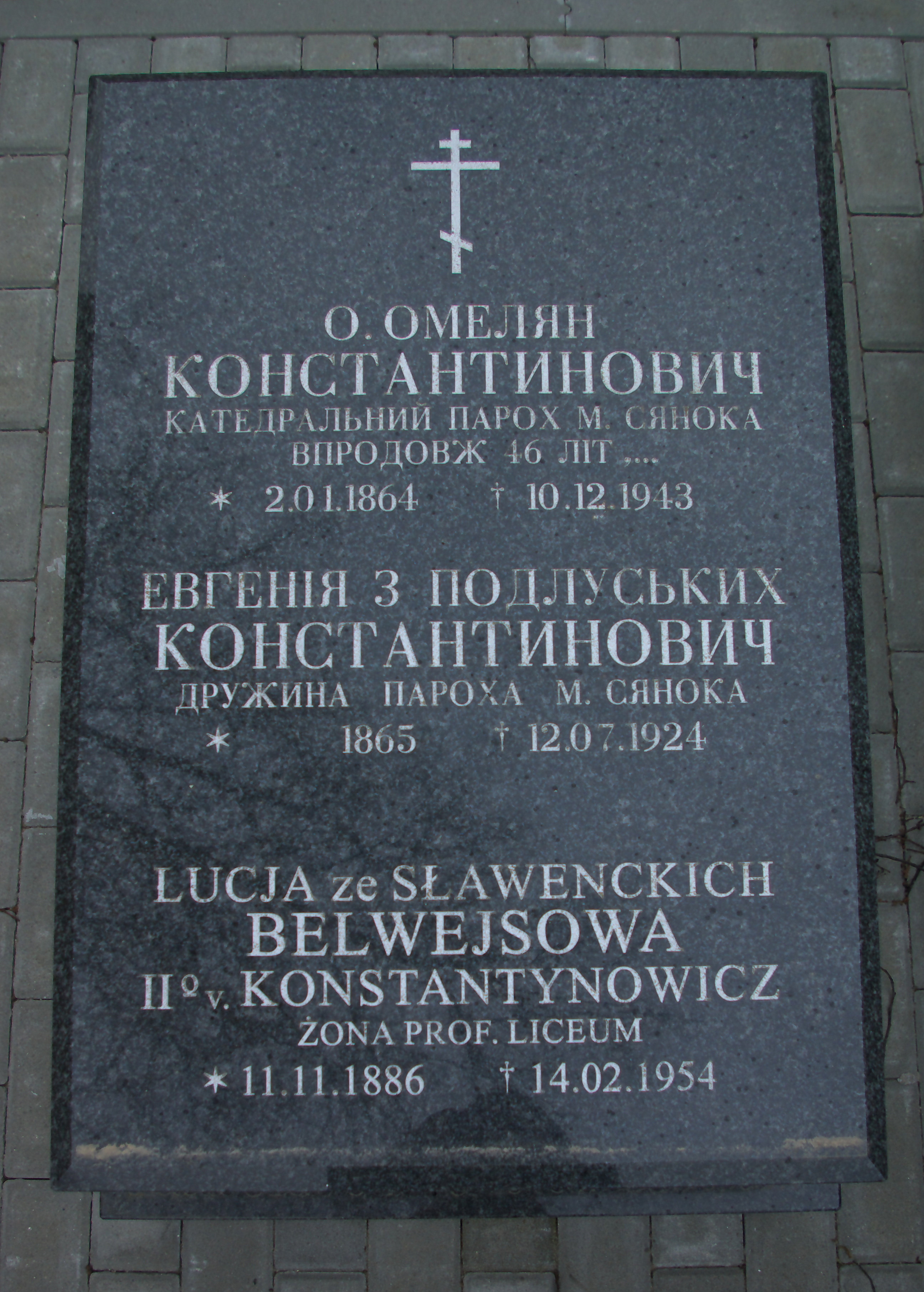 Grobowiec rodziny Konstantynowyczów, w tym proboszcza Omeljana.